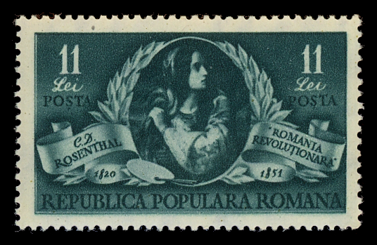 Timbru emis cu ocazia celebrării centenarului decesului lui Constantin Daniel Rosenthal în anul 1951